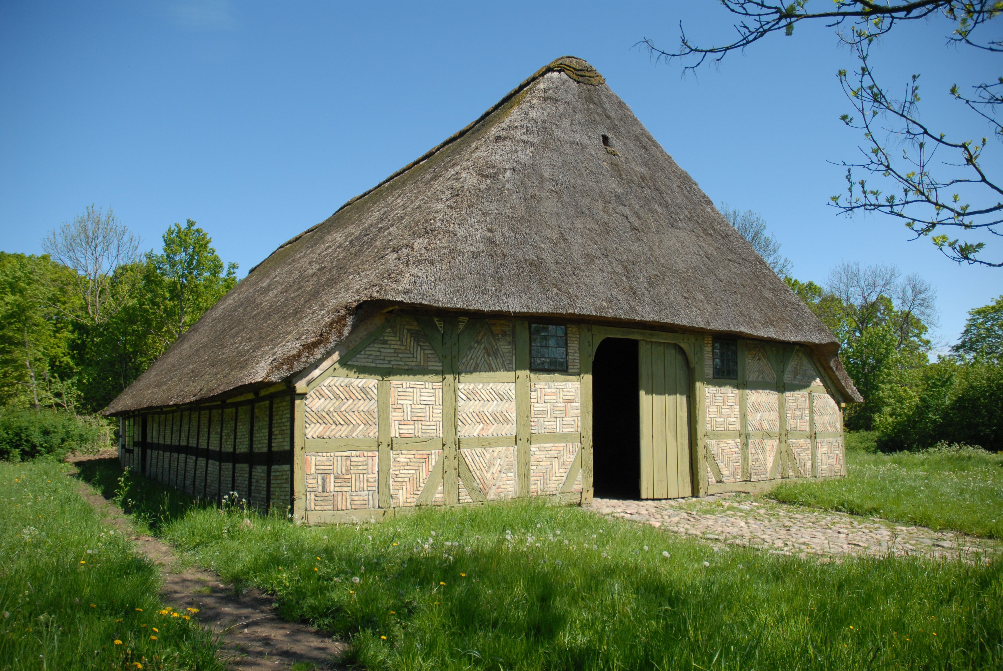 Ostenfeld set mod den åbne gavlport ind til dielen